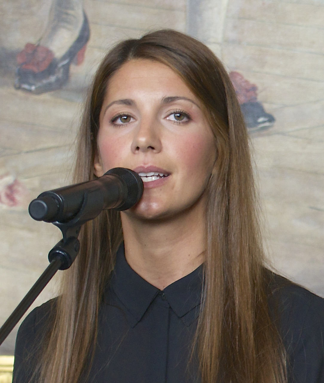 Nina Zanjani under Dramatens höstsamling 2014.